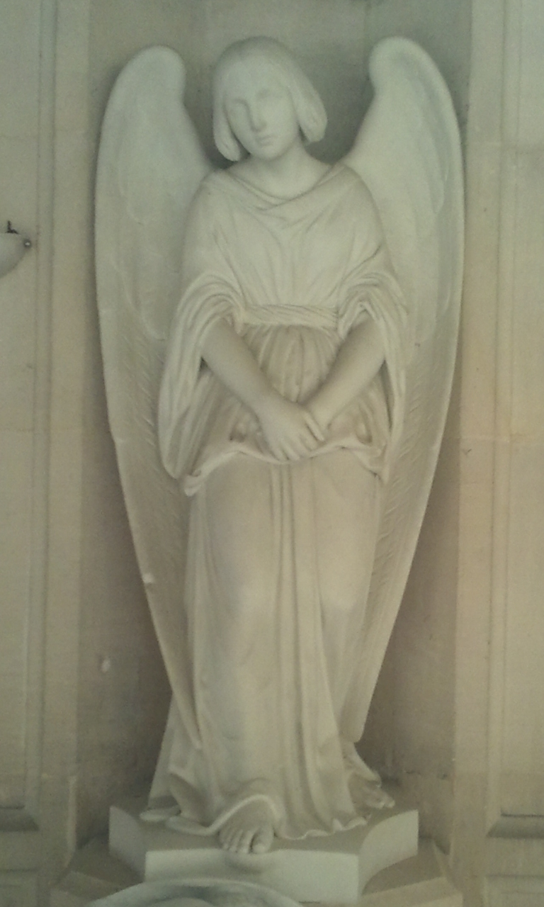 Ange de la Résignation qui surmonte le Gisant de Marie d'Orléans. Elle a sculpté l'Ange de la Résignation qui surmonte son tombeau.